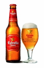 Estrella Damm 33cl en copa